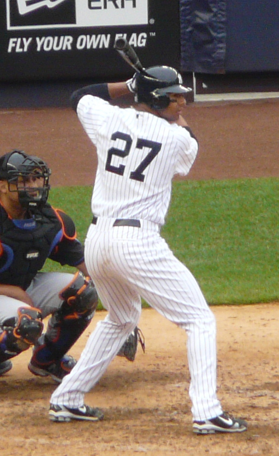 Chris Dickerson